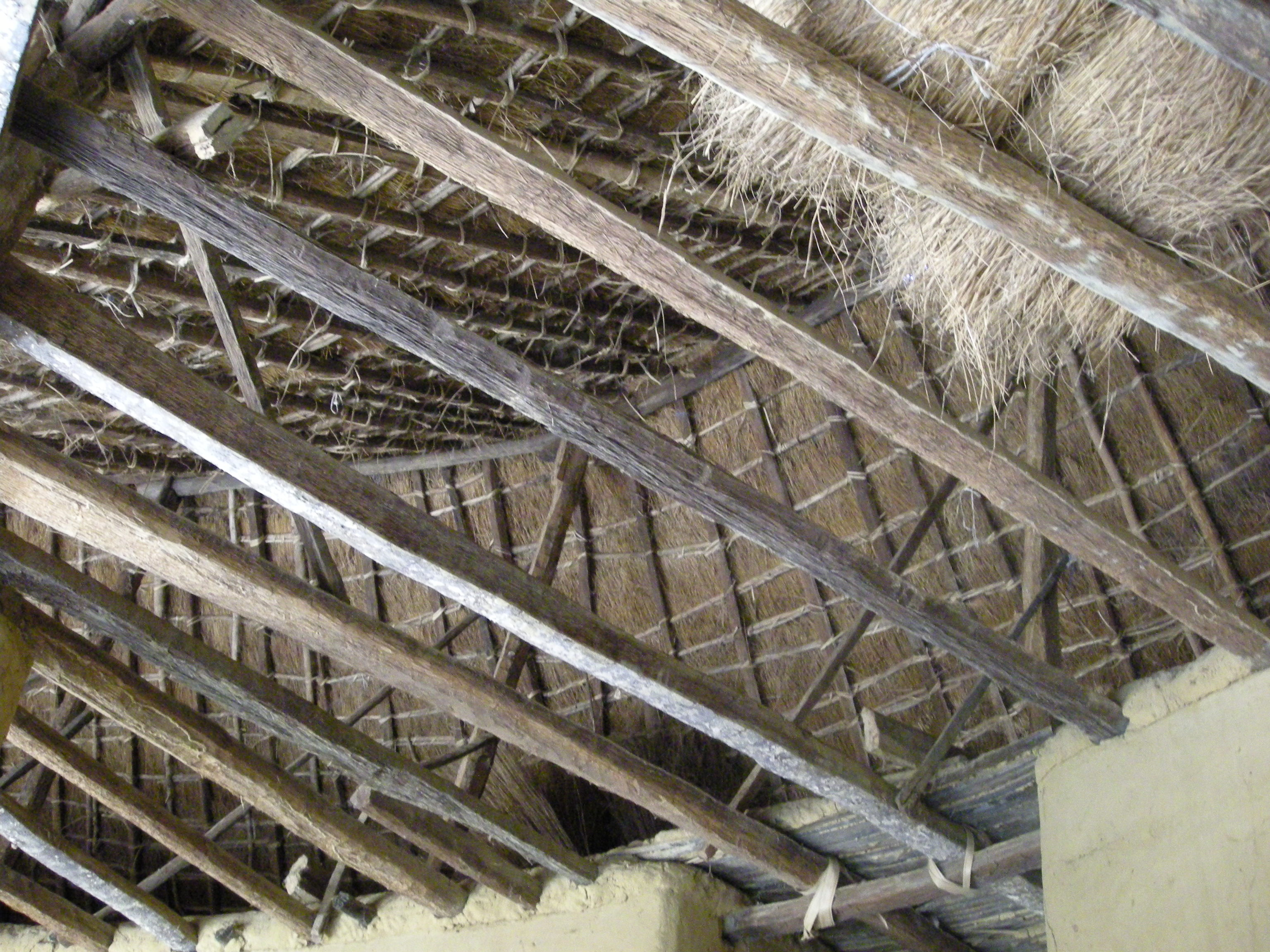 Charpente en bois de rônier (résistant aux termites) dans une case à impluvium à Enampor (Casamance, Sénégal)